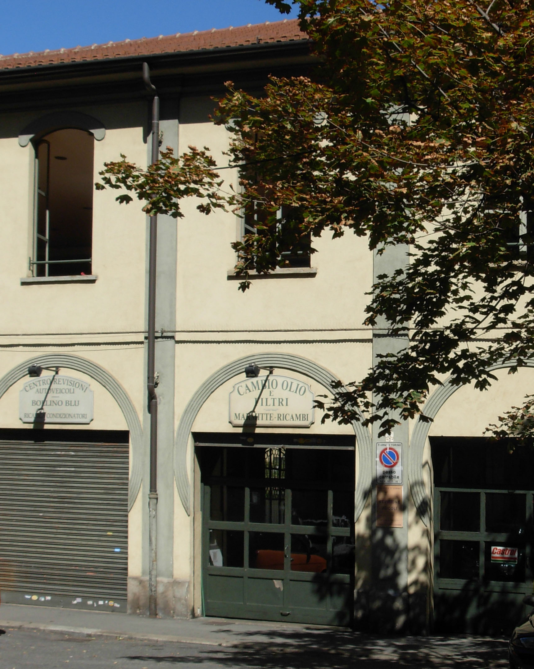 Le officine meccaniche di corso Raffaello